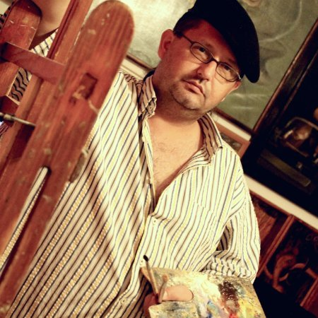 Portrét Daniela Geremuse